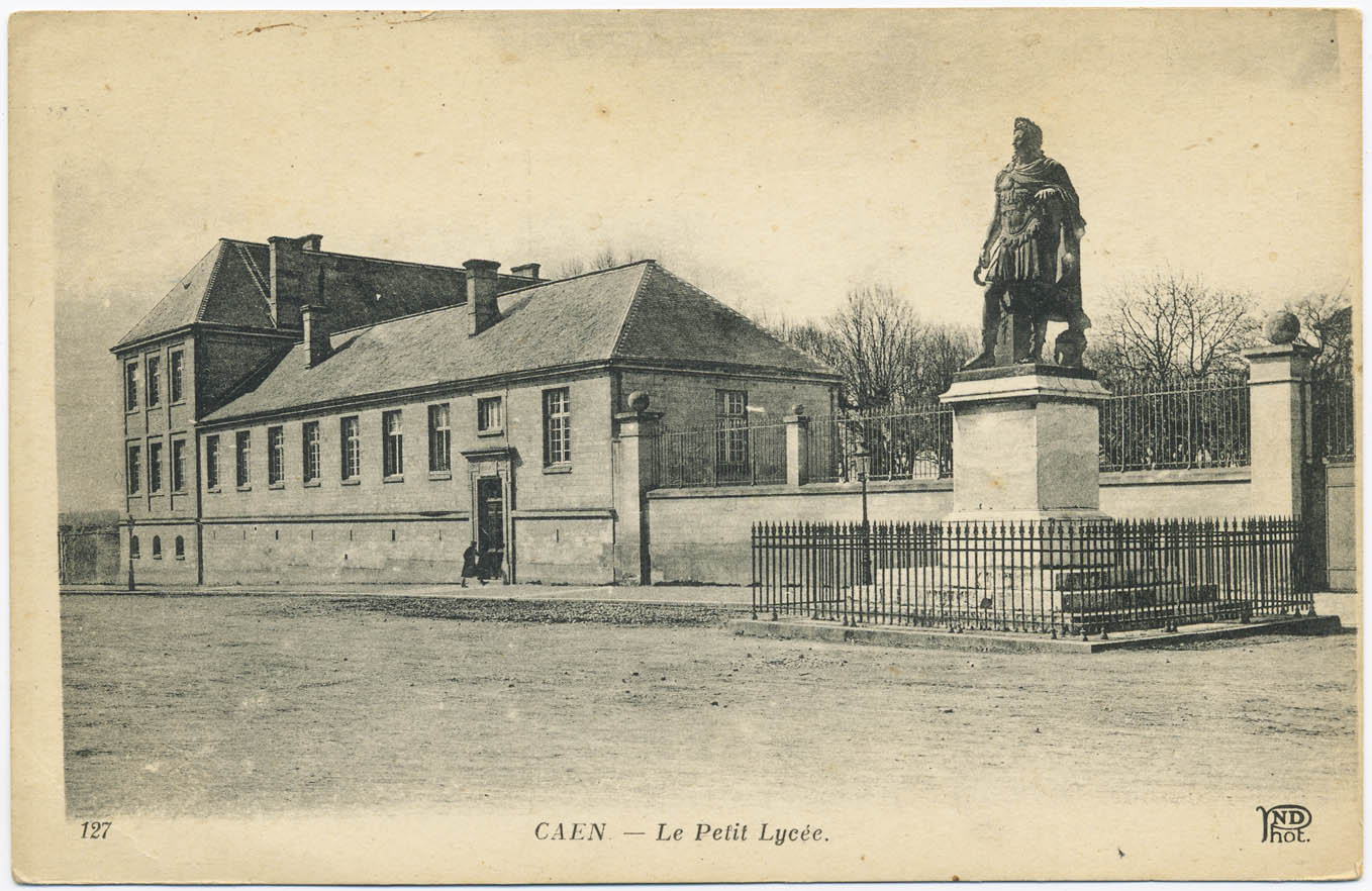 Petit Lycée, construit au XIXe dans les jardins de l'abbaye aux Hommes de Caen